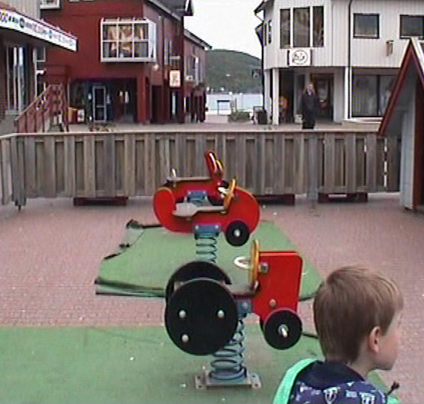 Ortszentrum von Rognan, Norwegen